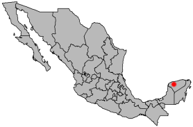 Location of Mérida, Yucatán, Mexico